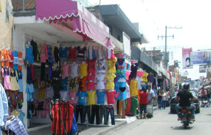 ropa 33 en Uriangato